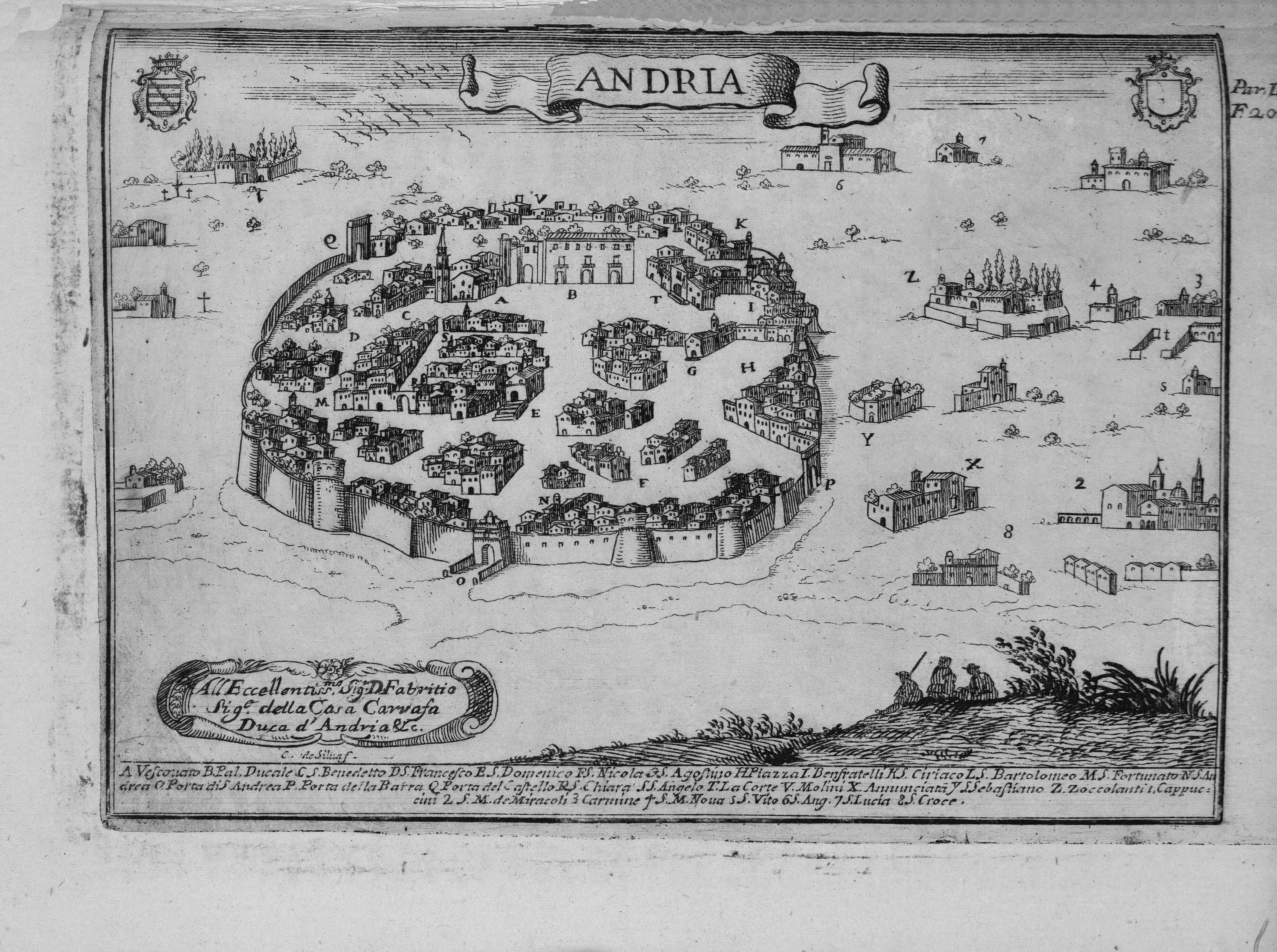 Autor: Pacichelli, Giovanni Battista, 1641-1702 Descripción bibliográfica: Il regno di Napoli in prospettiva : diviso in dodeci provincie, in cui si descrivono la sua Metropoli Fidelissima città di Napoli ... Opera postuma divisa in tre parti / dell'abatte Gio. Battista Pacichelli ; Parte prima [-terza] ... Del regno di Napoli in prospettiva / dell'abate Pacichelli. Parte prima. - In Napoli : nella Stamperia di Michele Luigi Mutio, 1703. - v. : principalmente il.; 4º . - Inic. adorn. y frisos dec. - Grab. calc. y h. pleg. grab. calc. de mapas de Cassianus de Silva. Ilustrador: Cassiano De Silva, Francesco, il. Impresor: Muzio, Michele Luigi, imp. Lugar de impresión: Italia. Nápoles Localización: Vea la ilustración en su contexto